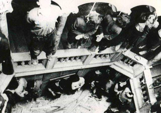 Eccidio di via Ghega (Palazzo Rittmeyer, Trieste)